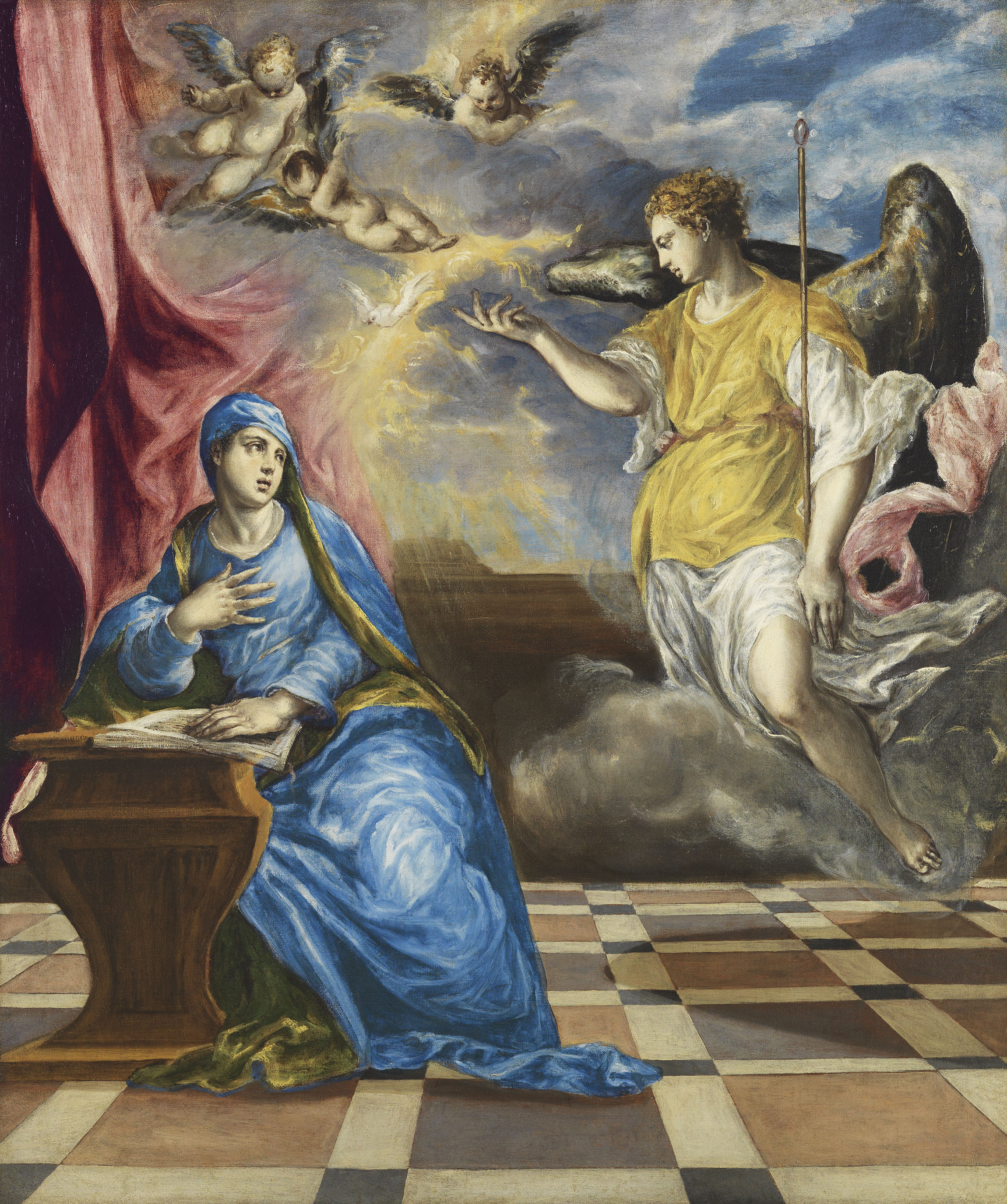 La obra representa el momento en que el Arcángel San Gabriel anunció a la Virgen María que sería la madre de Jesucristo, el Mesías.